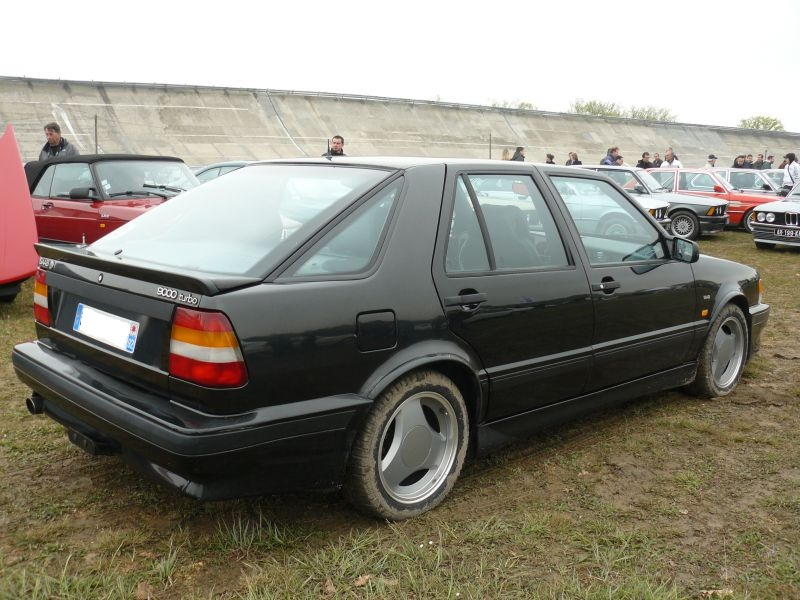 Français cadien: Montlhery Avril 2012